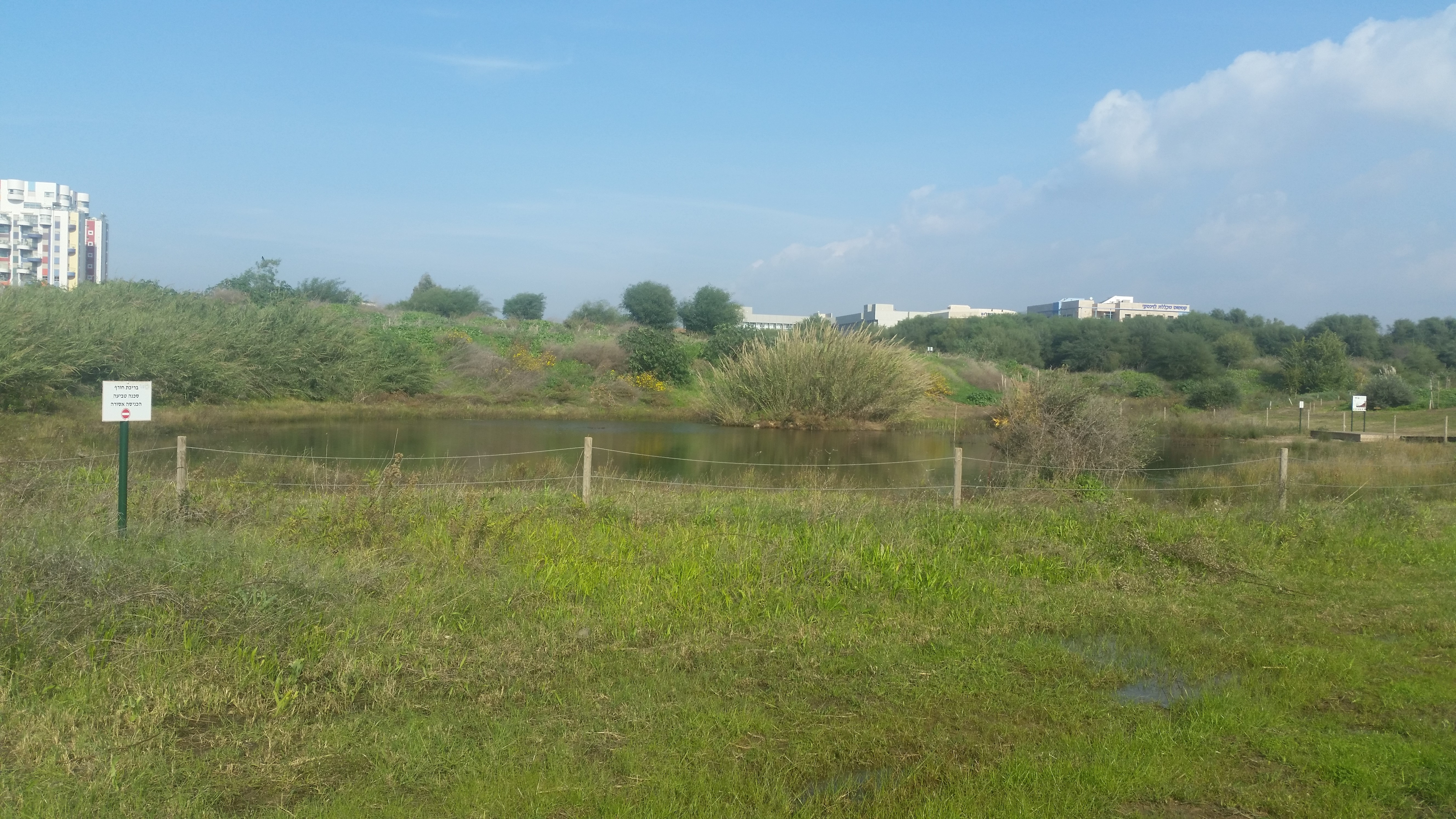 בריכת חורף בצפון תל אביב